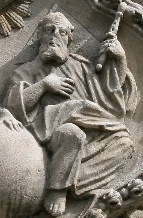 Darstellung des Gottvaters im Himmelreich auf dem ehem. Grabstein der Familie Friede auf dem Gnadenkirchhof in Jelenia Góra (Hirschberg) (um 1725)